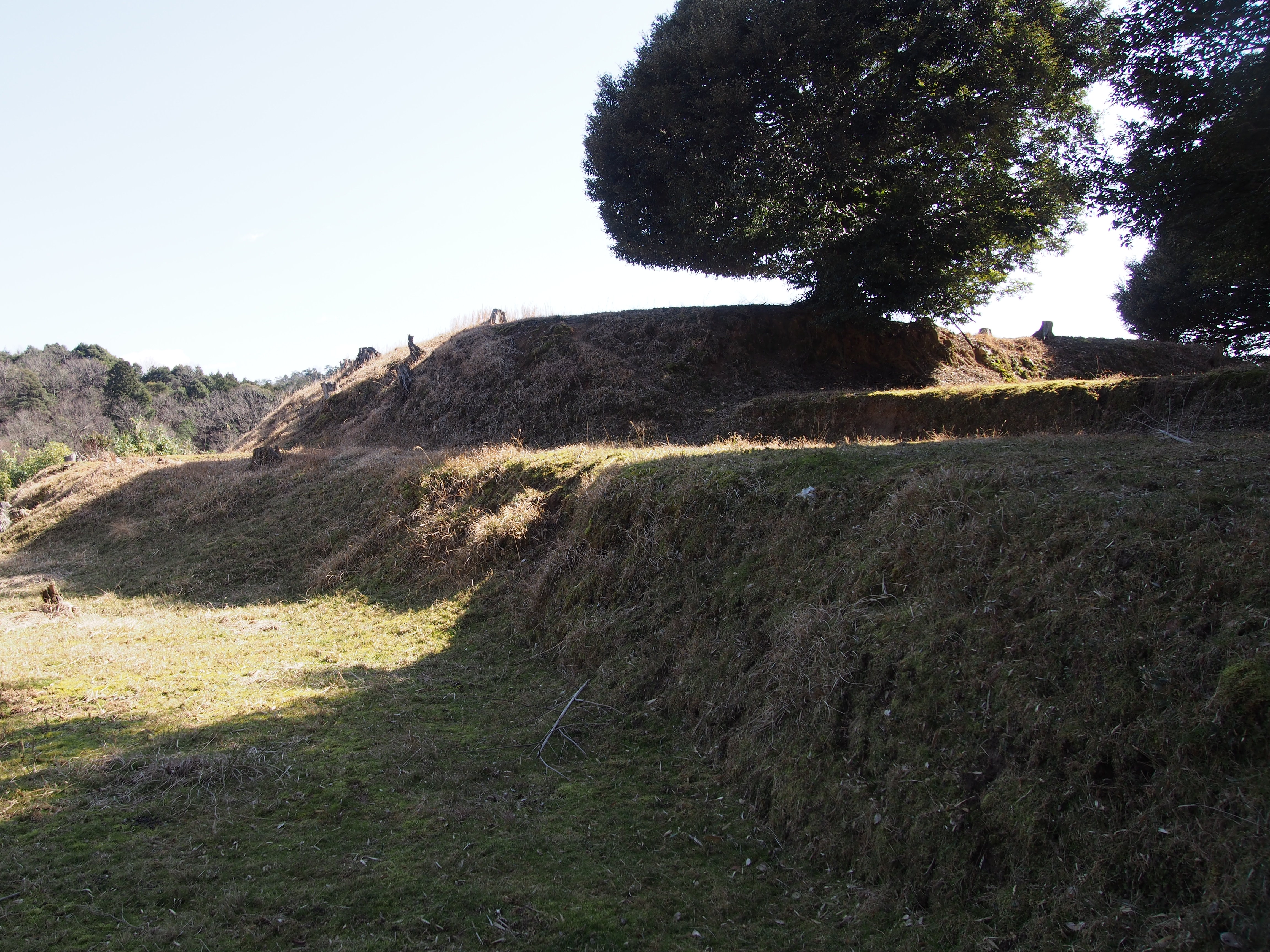 国指定史跡 赤坂今井墳墓（京都府京丹後市峰山町赤坂） 北西側からの近景